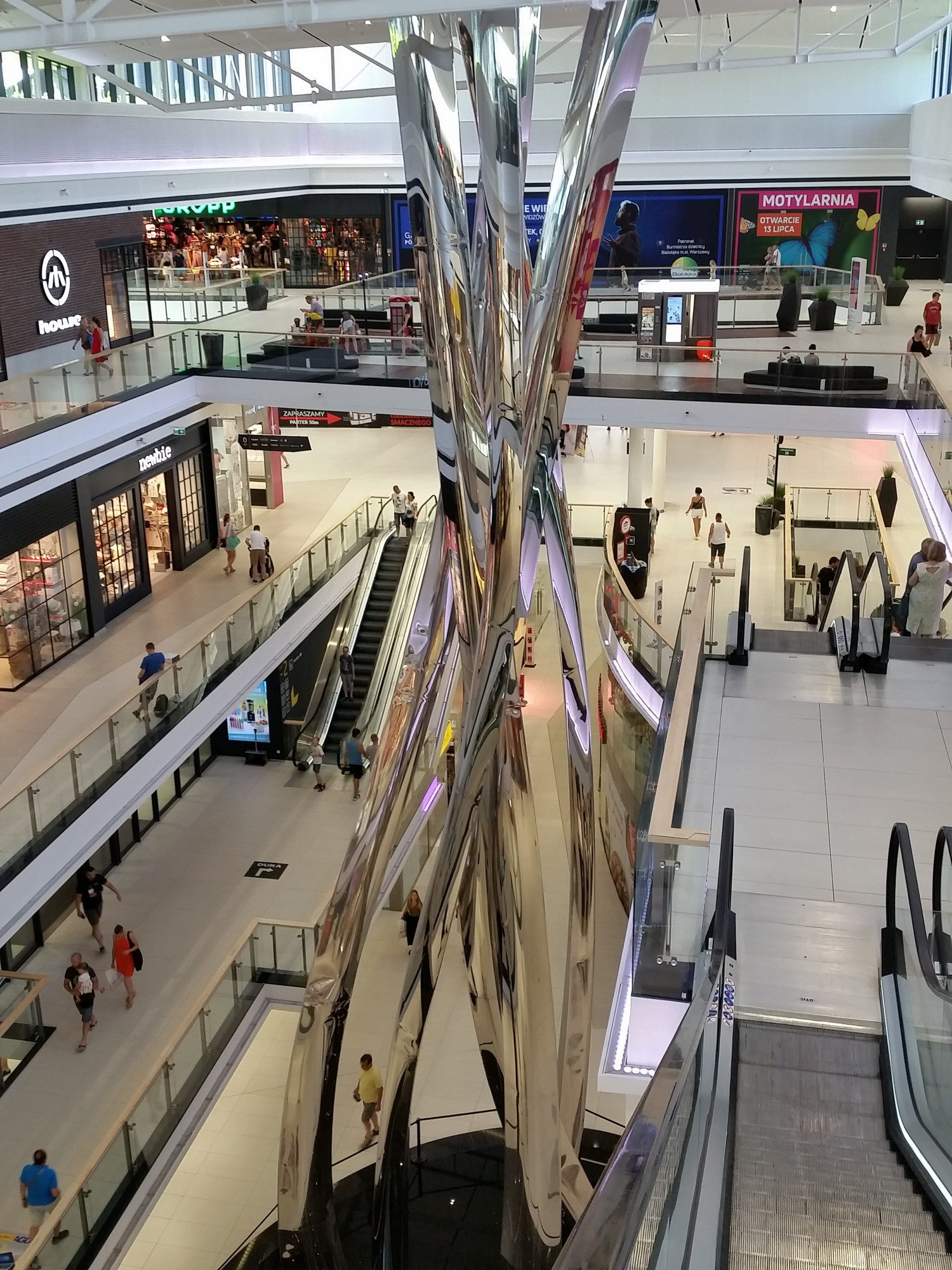 Widok na wnętrze Galerii Północnej w Warszawie.